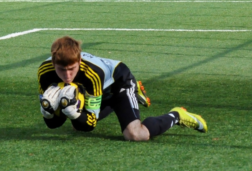 Алексей Олегович Казаков — украинский футболист.